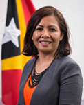 Carmelita Caetano Moniz, Abgeordnete des Nationalparlaments Osttimors